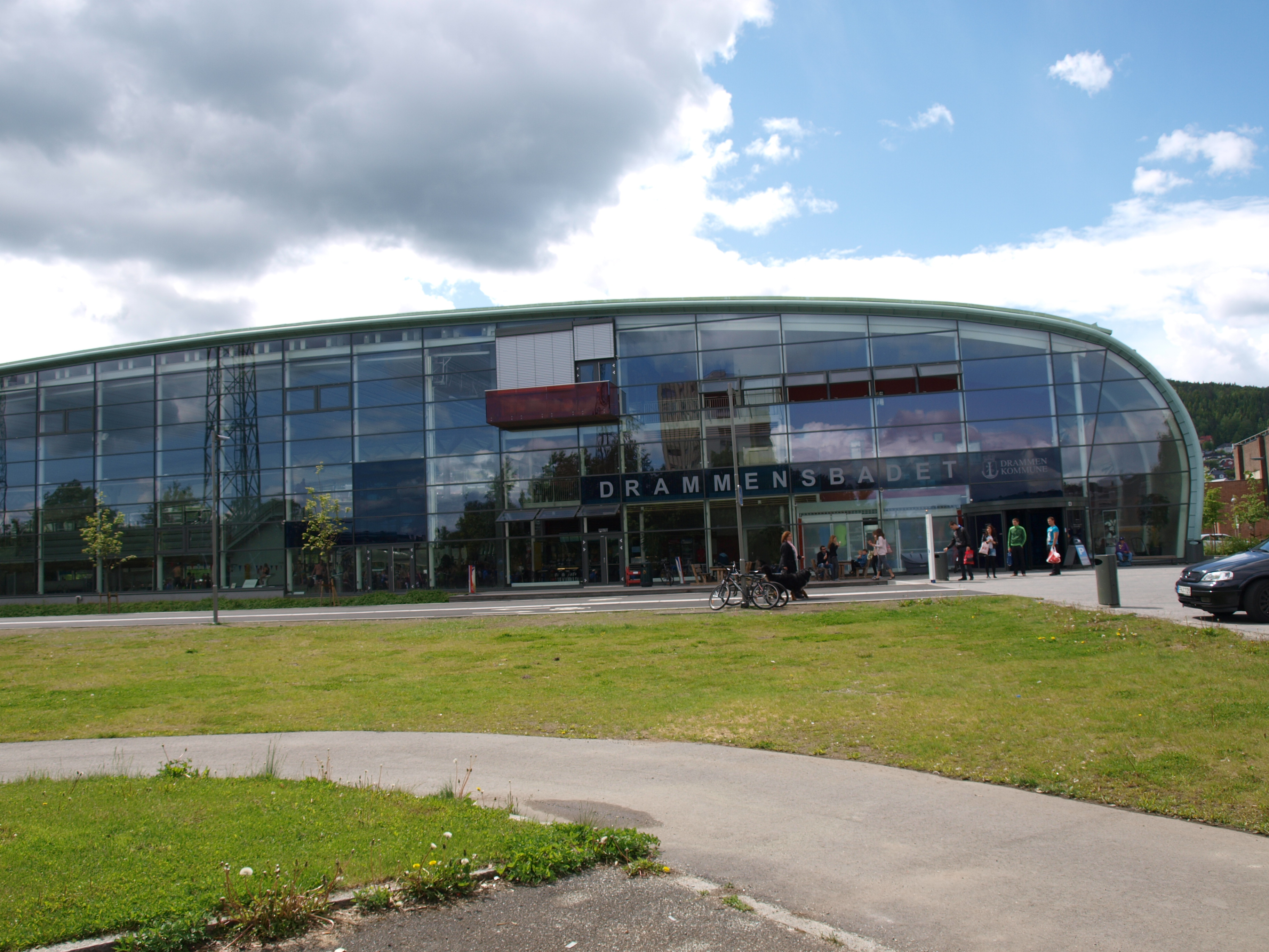 Drammensbadet, juni 2011.